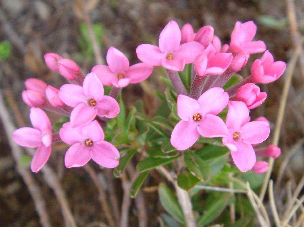 Daphne cneorum close-up